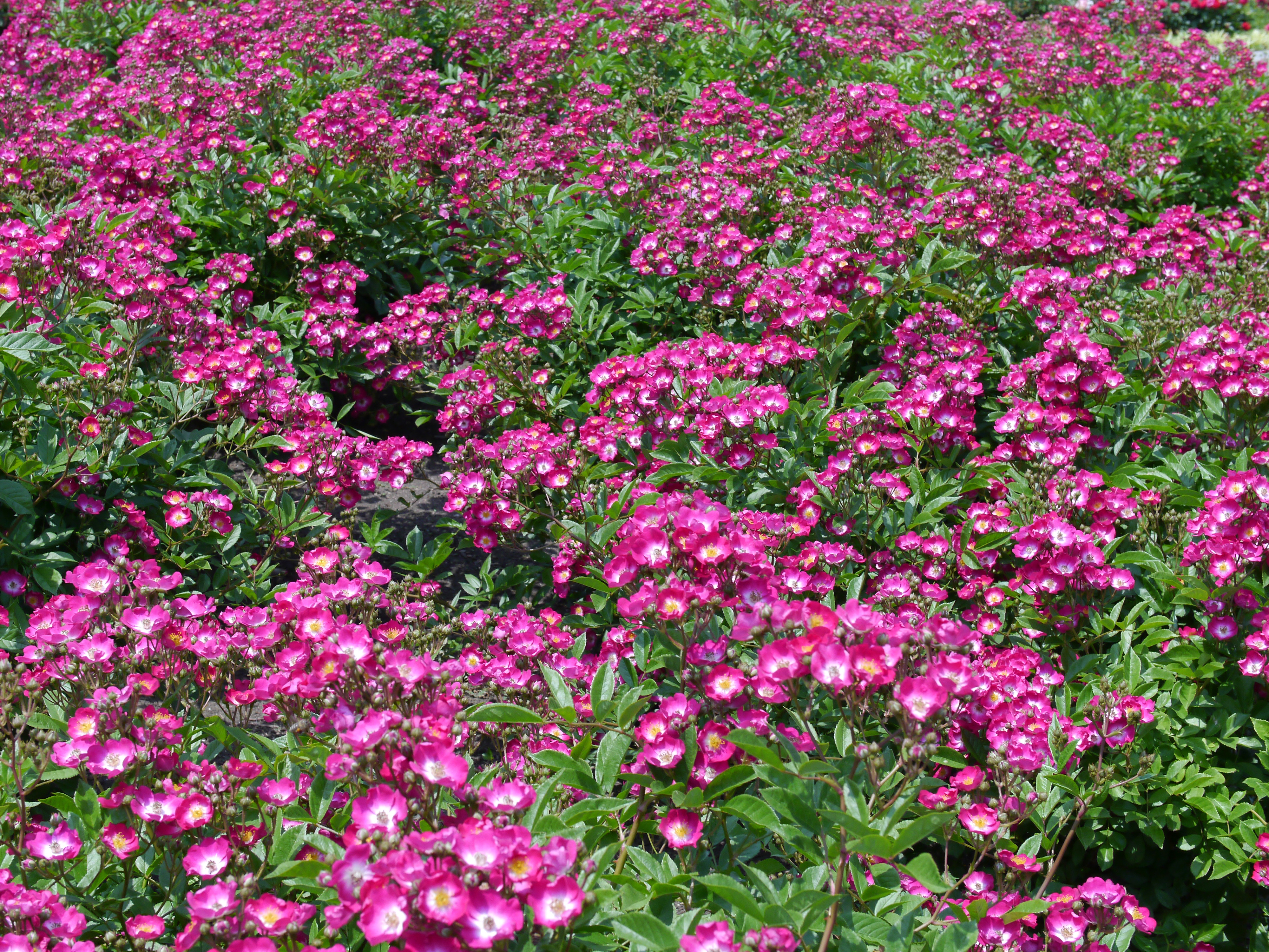 Rose, Marjorie Fair, バラ, マジョリー フェア, Shrub rose シュラブ United Kingdom イギリス Harkness 1977